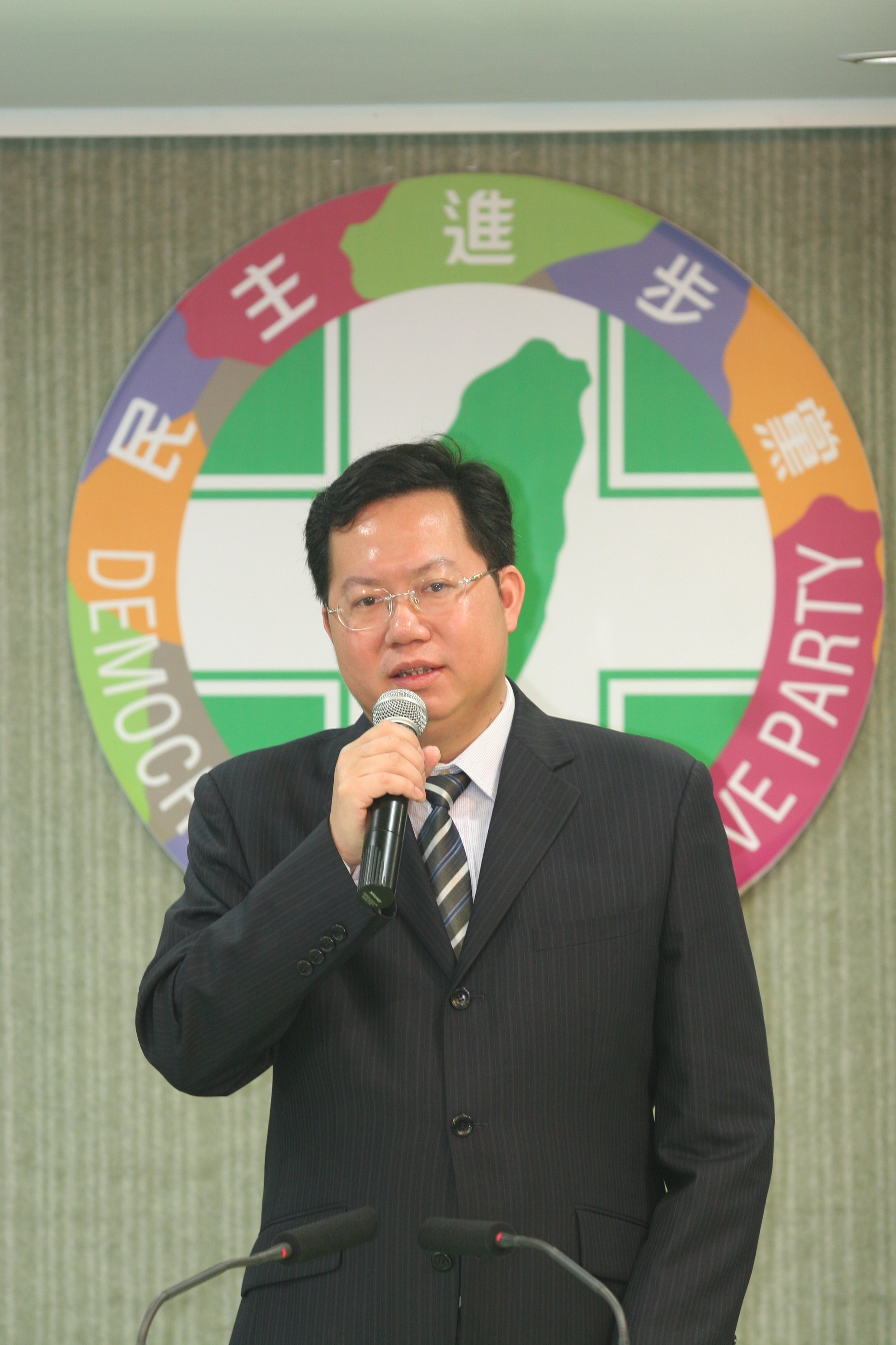 中文（台灣）: 民主進步黨文宣部主任鄭文燦主持中央黨部記者會。